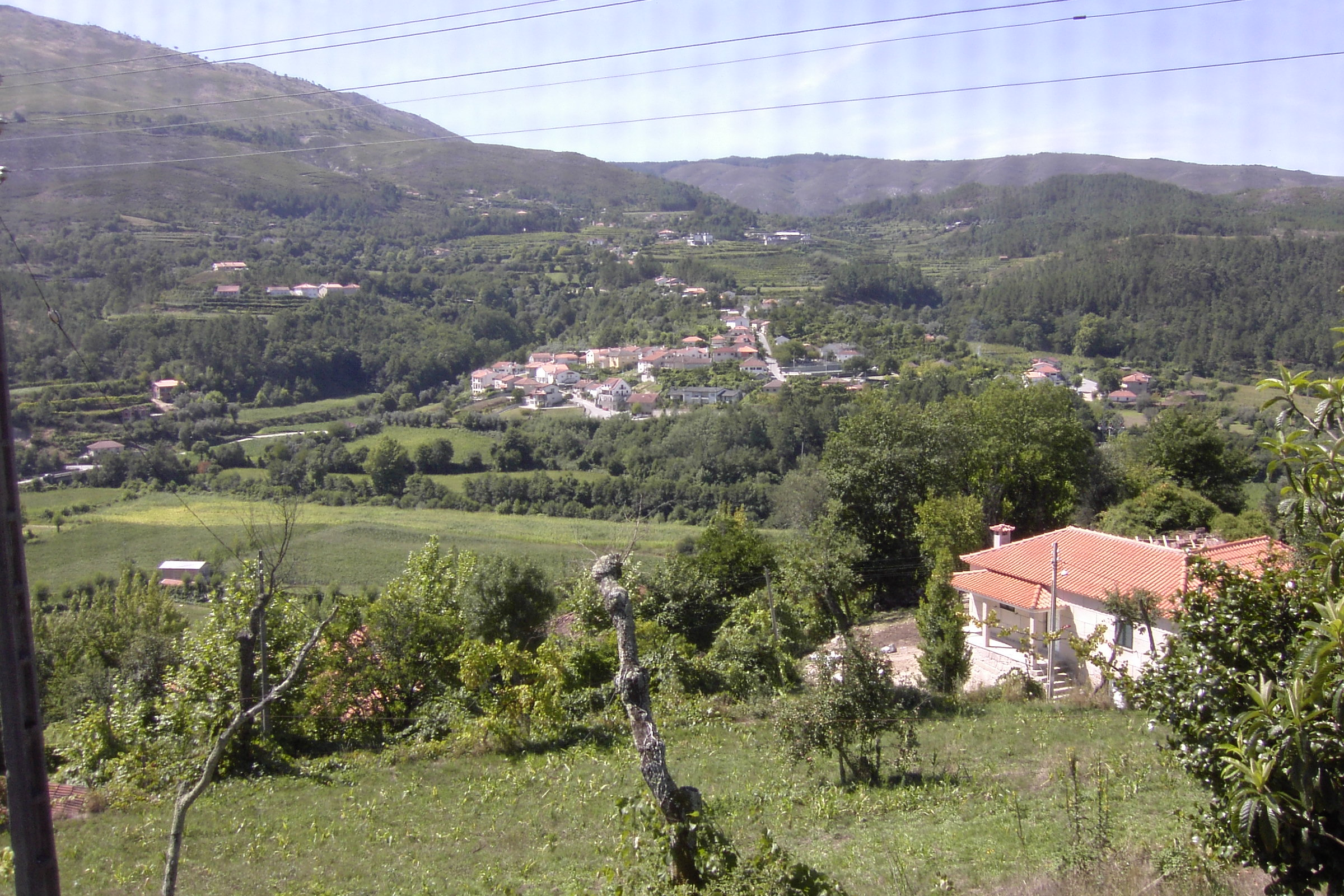 Cerva. vista sobre o lugar de Feira da Lomba. LOCAL: Cerva, Ribeira de Pena